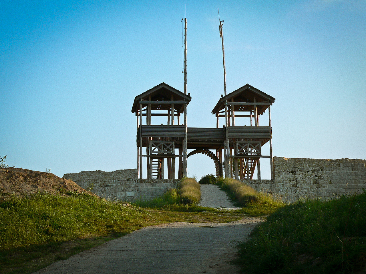 a római kori Lussonium katonai tábora építészeti maradványai (Paks, Dunakömlőd, Bottyánsánc) This is a photo of a monument in Hungary. Identifier: 11386